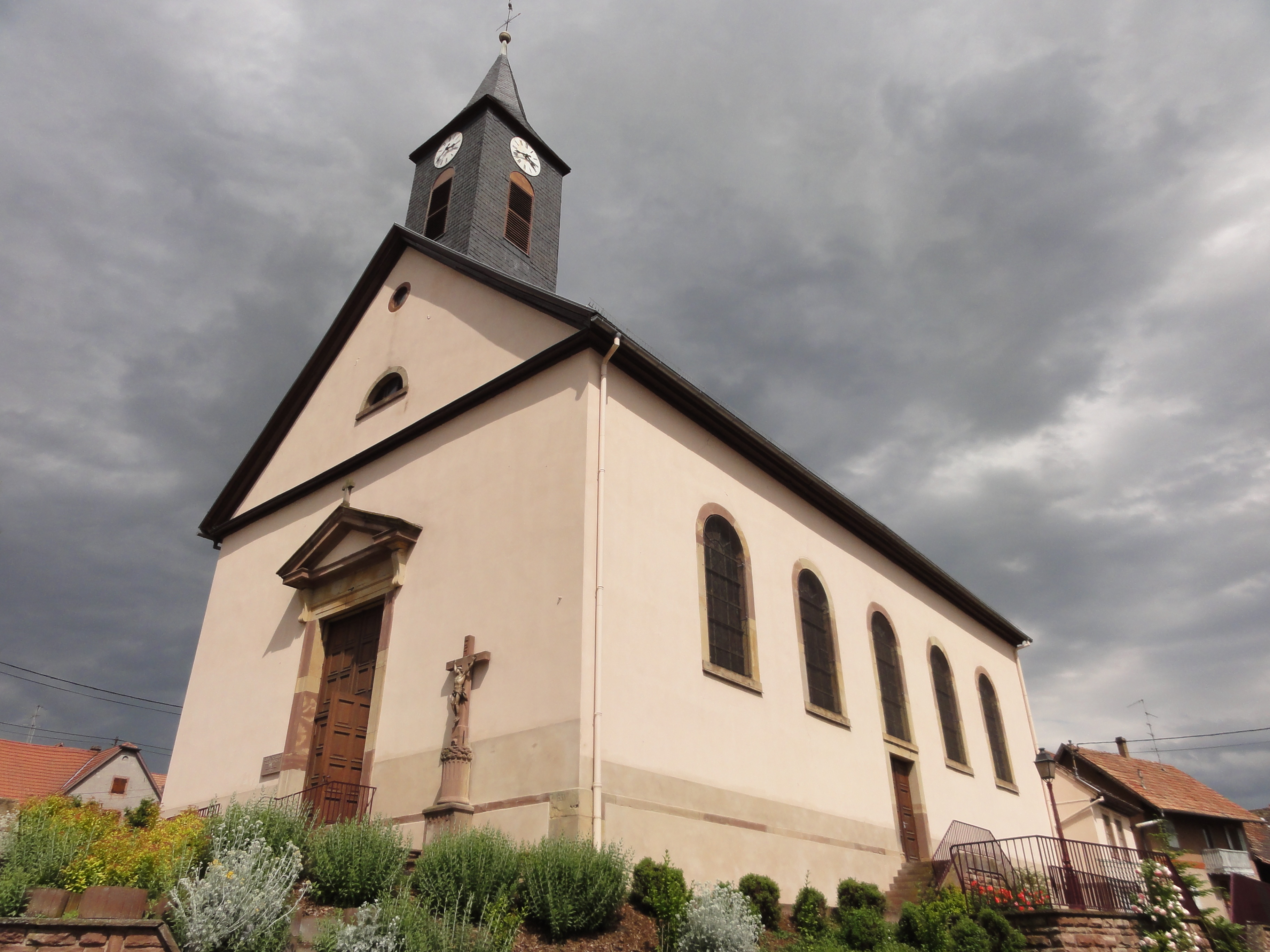 Alsace, Bas-Rhin, Église Saints-Côme-et-Damien d'Ernolsheim-Bruche (IA67011859).